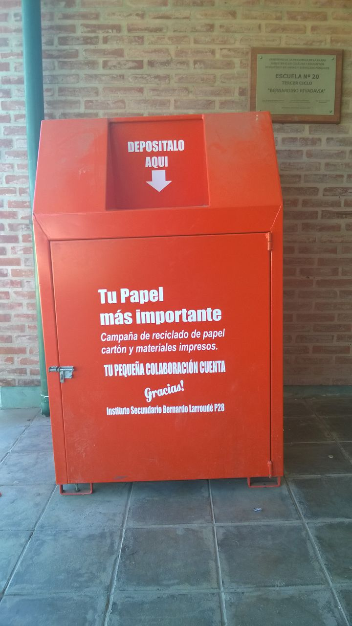 Campaña de Reciclado de papel y cartón de alumnos en el Instituto Secundario Bernardo Larroudé, La Pampa, Argentina.